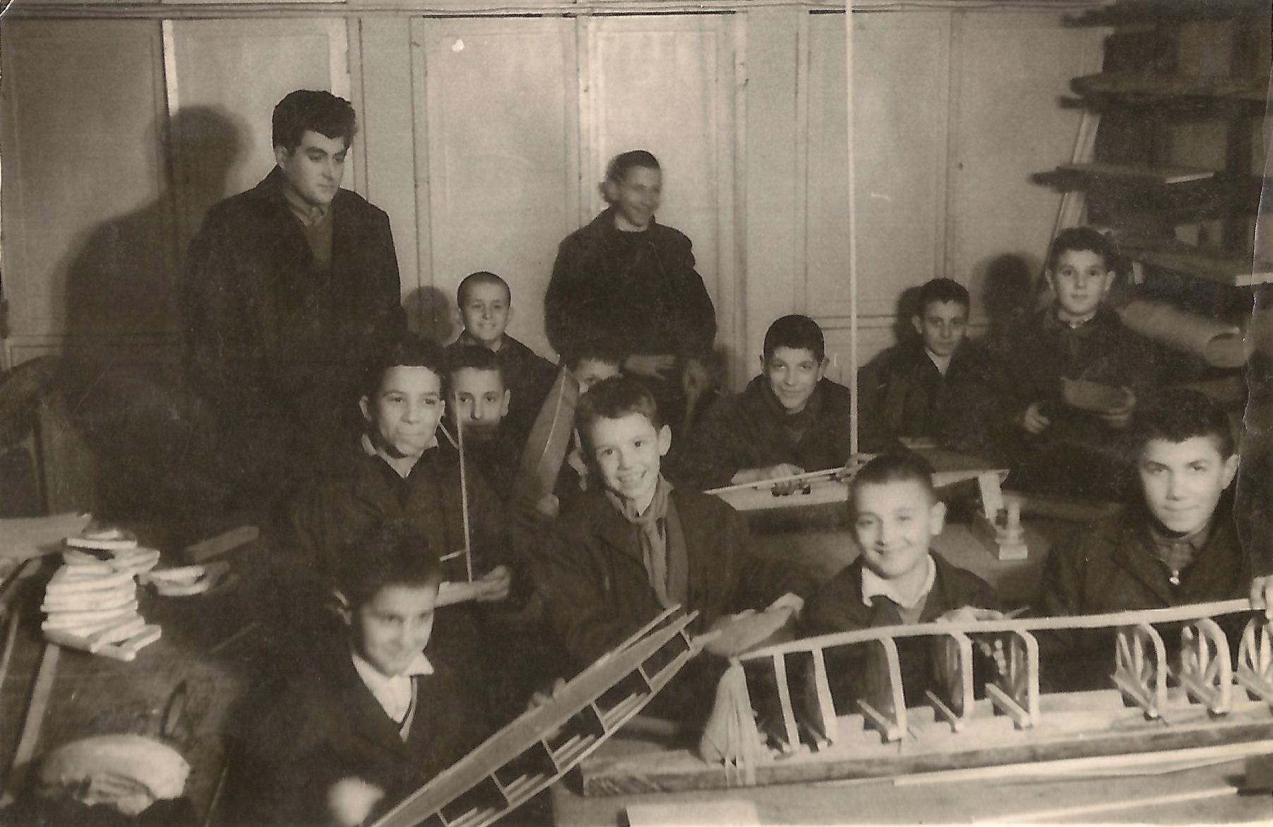 Кръжок по корабомоделизъм към Пионерски дом в Ботевград. Началото на 1970-те години. Отзад, в средата - Христо Стефанов Боевски - кръжок-ръководител; Отзад, вляво - Георги Воденичаров - капитан I-ви ранг.